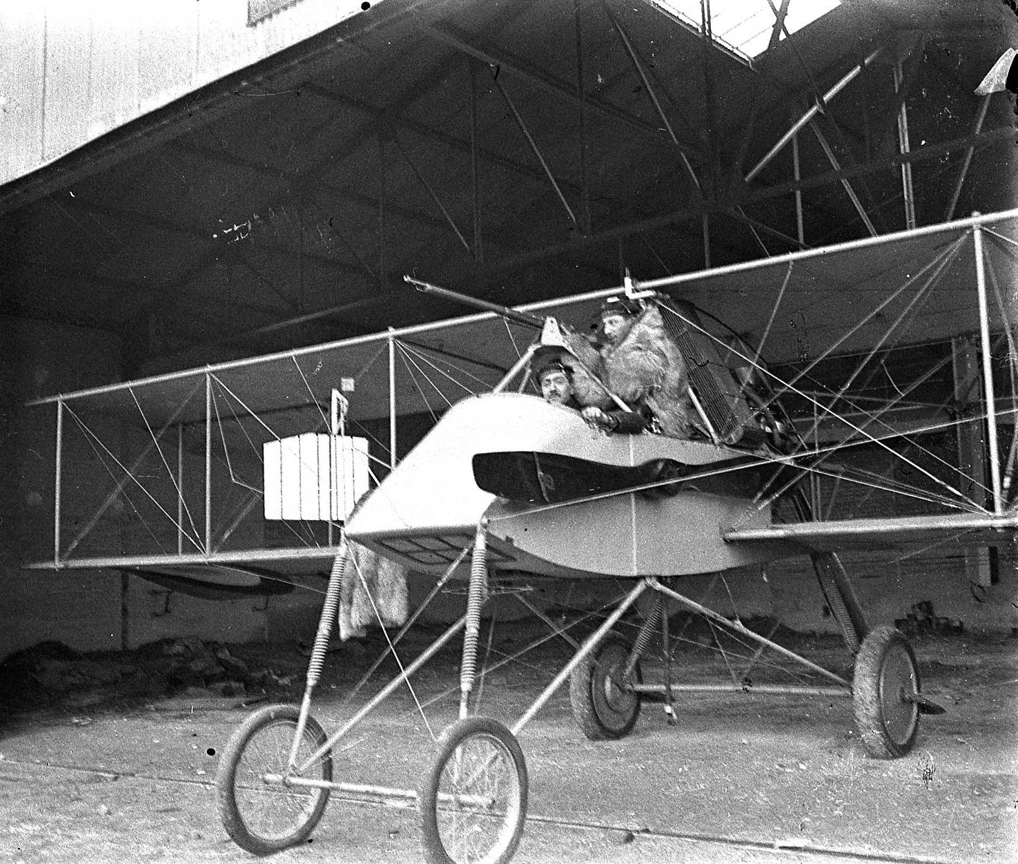 Vue de MM. Sauzay et Roussillon posant dans un biplan Voisin dans un hangar près d'Amiens (Somme). L'observateur utilize un fusil sur trépeid. Mai-juin 1915. Guerre 1914-1918. Ils sont sur le départ.